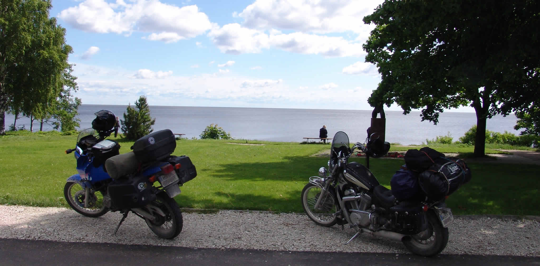 Am Peipussee bei Kallaste.